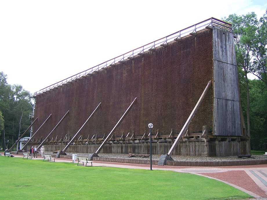 Gradierwerk II: Das kleinere der zwei Gradierwerke im Kurpark in Bad Westernkotten